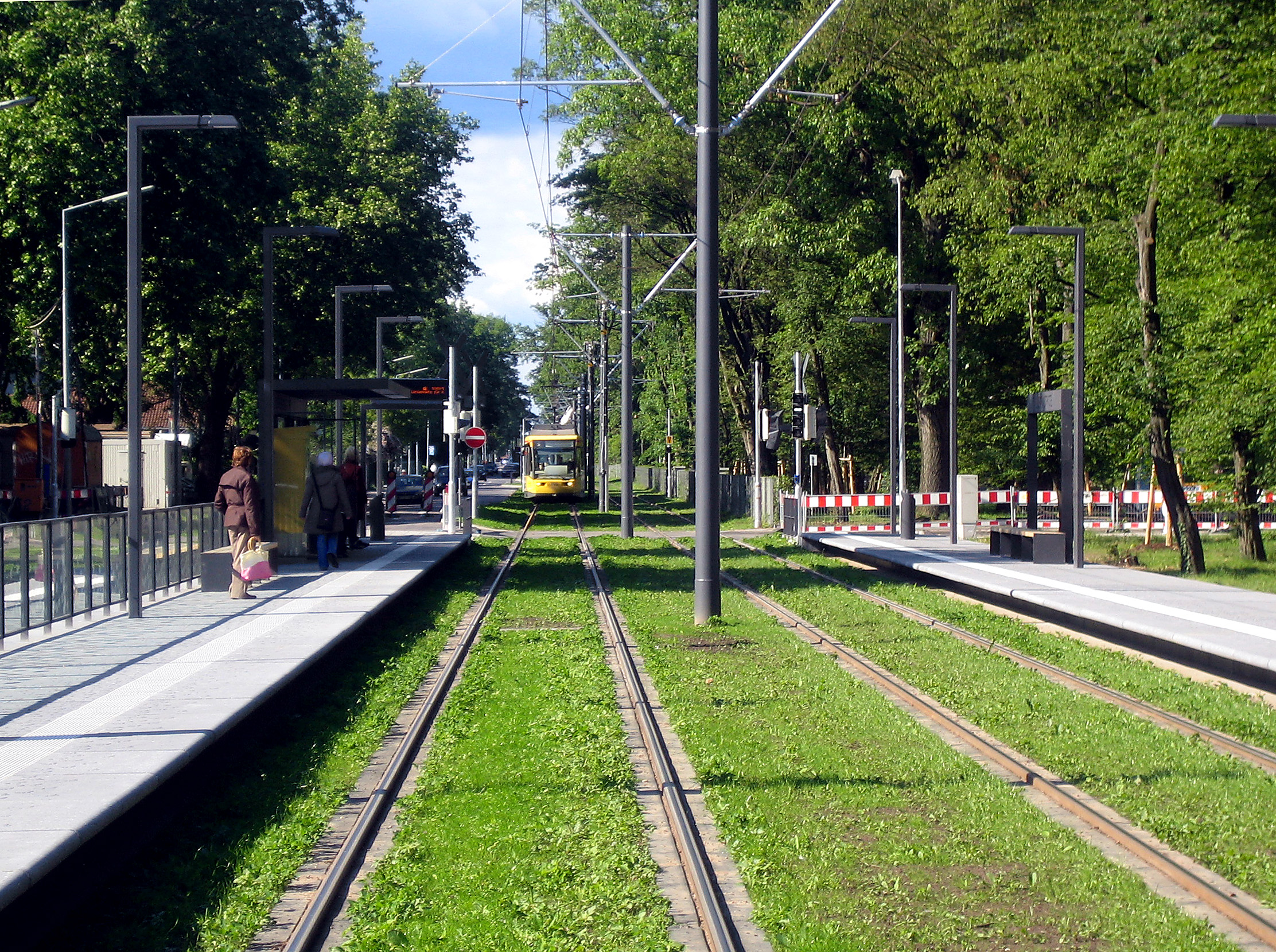 Nordstadtrbahn auf der von 1870 bis 1913 genutzten Hardtbahntrasse